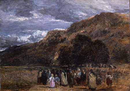 A Welsh Funeral